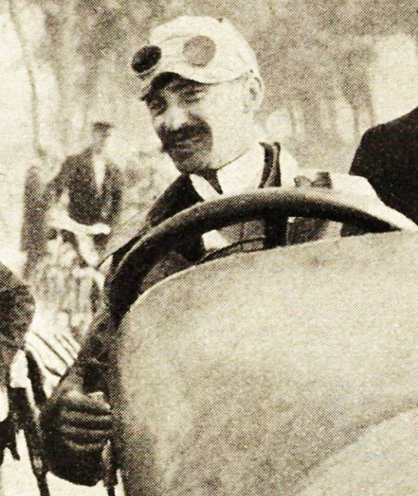 Louis Rigolly en 1904 à Ostende (RM officiel à 166.666 km/h sur le kilomètre lancé en juillet avec Gobron-Brillié) - La Vie au Grand Air du 28 juillet 1904, p.604